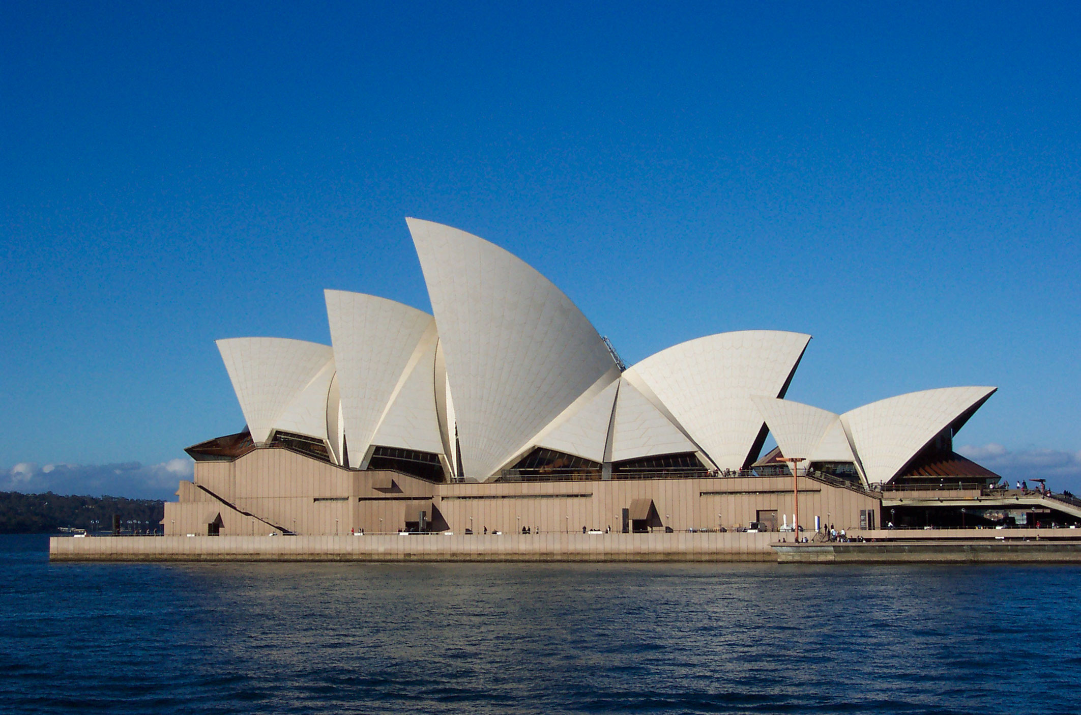 Oʻzbekcha/ўзбекча: Sidney Opera Teatrining umumiy ko'rinishi